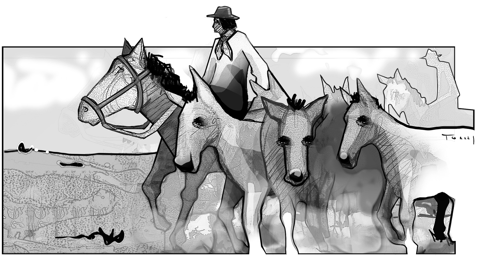 Testimonio gráfico de los arreos de Francisco Candioti, por el camino de Santiago del Estero, que motivó el "descubrimiento" de Progreso